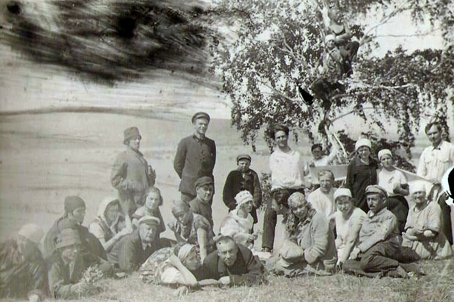 Жигулёвская кругосветка в 1927 году.